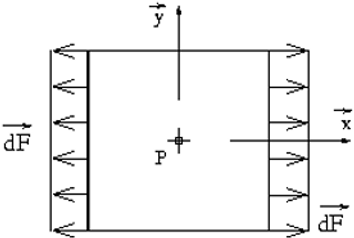 Etat d'équilibre d'une plaquette sous sollicitation uniaxiale